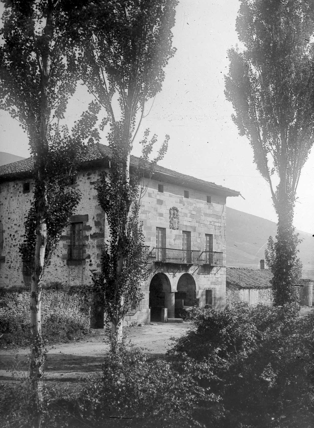 Laudioko Gardea auzoko Katuxa jauregia. Eraikina Laudioko Gardea auzoan kokatzen den Katuxa Jauregia da. Info osagarria eta argazkiak Amalur Fundazioko webgunean eta Wikipedian kontsultatu daitezke